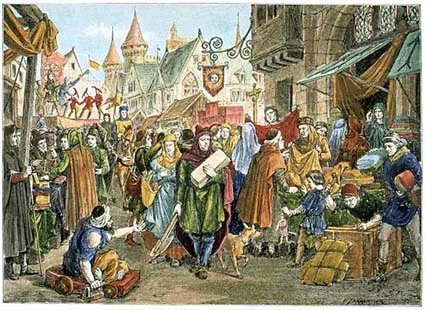 Středověký trh